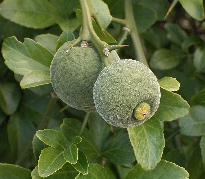 Poncirus trifoliata